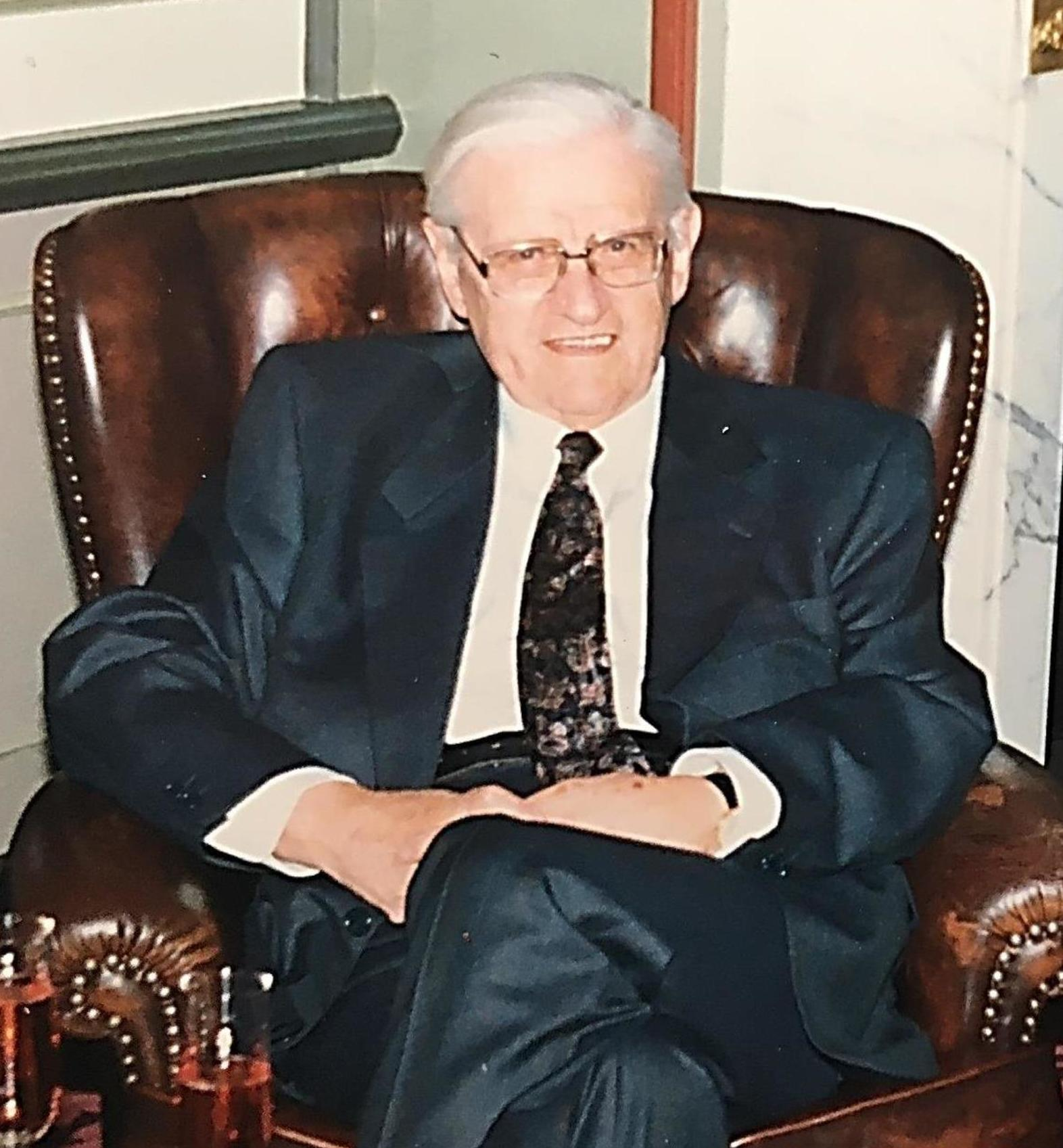 Familiefoto van 50-jarig huwelijksfeest van Jos van Amelsvoort